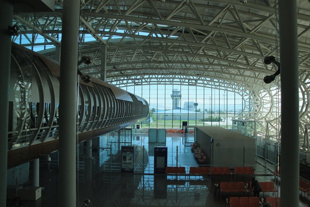 Erzincan Havalimanı terminal girişi, 2011.